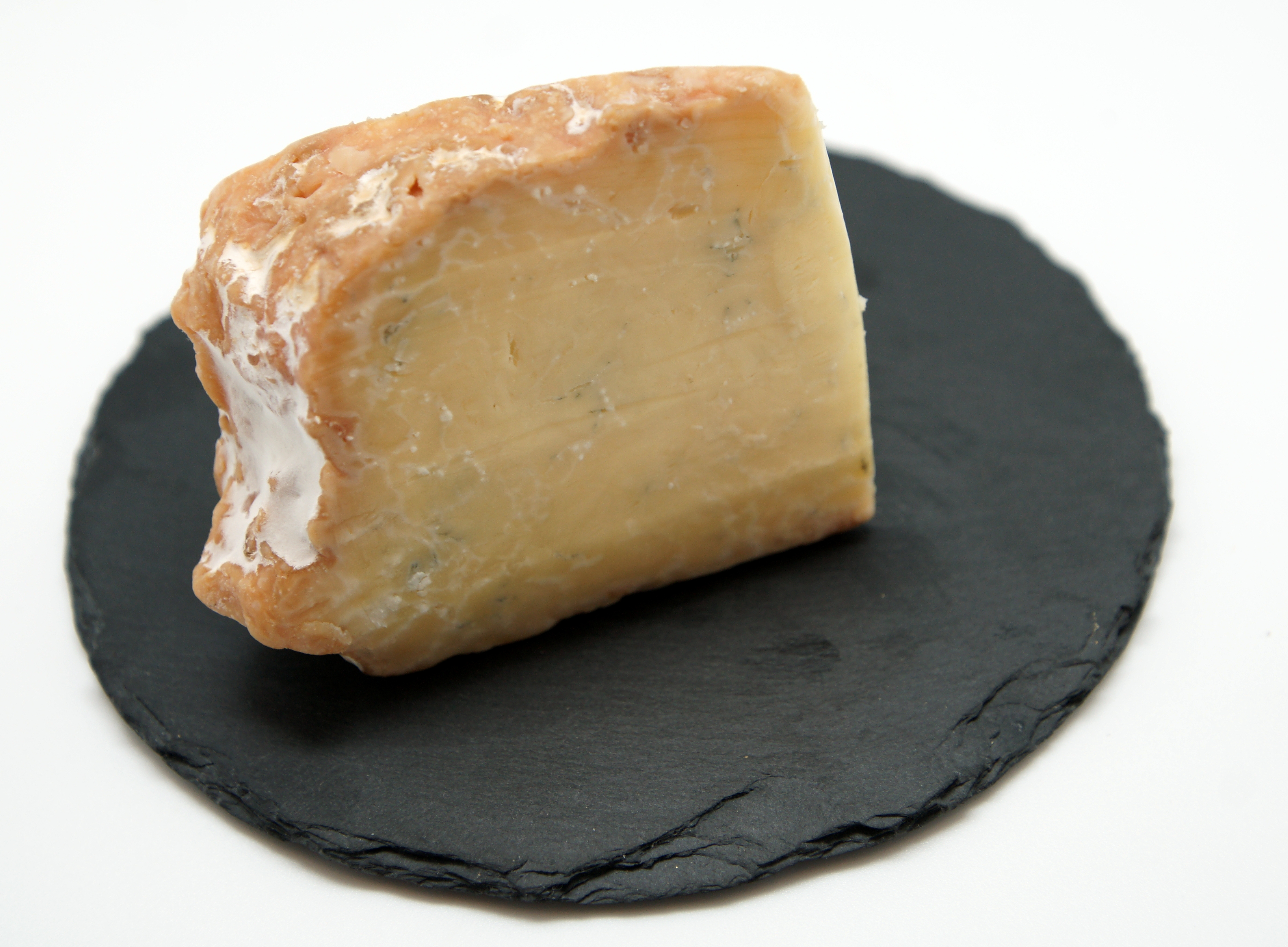 Belper Mürggel (medium aged), a Swiss cheese